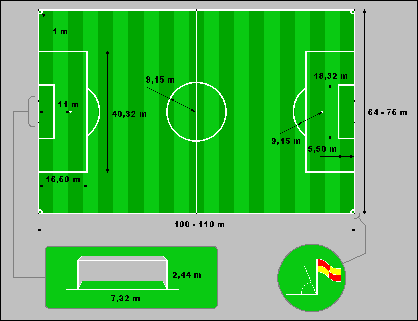 Schemat boiska do piłki nożnej